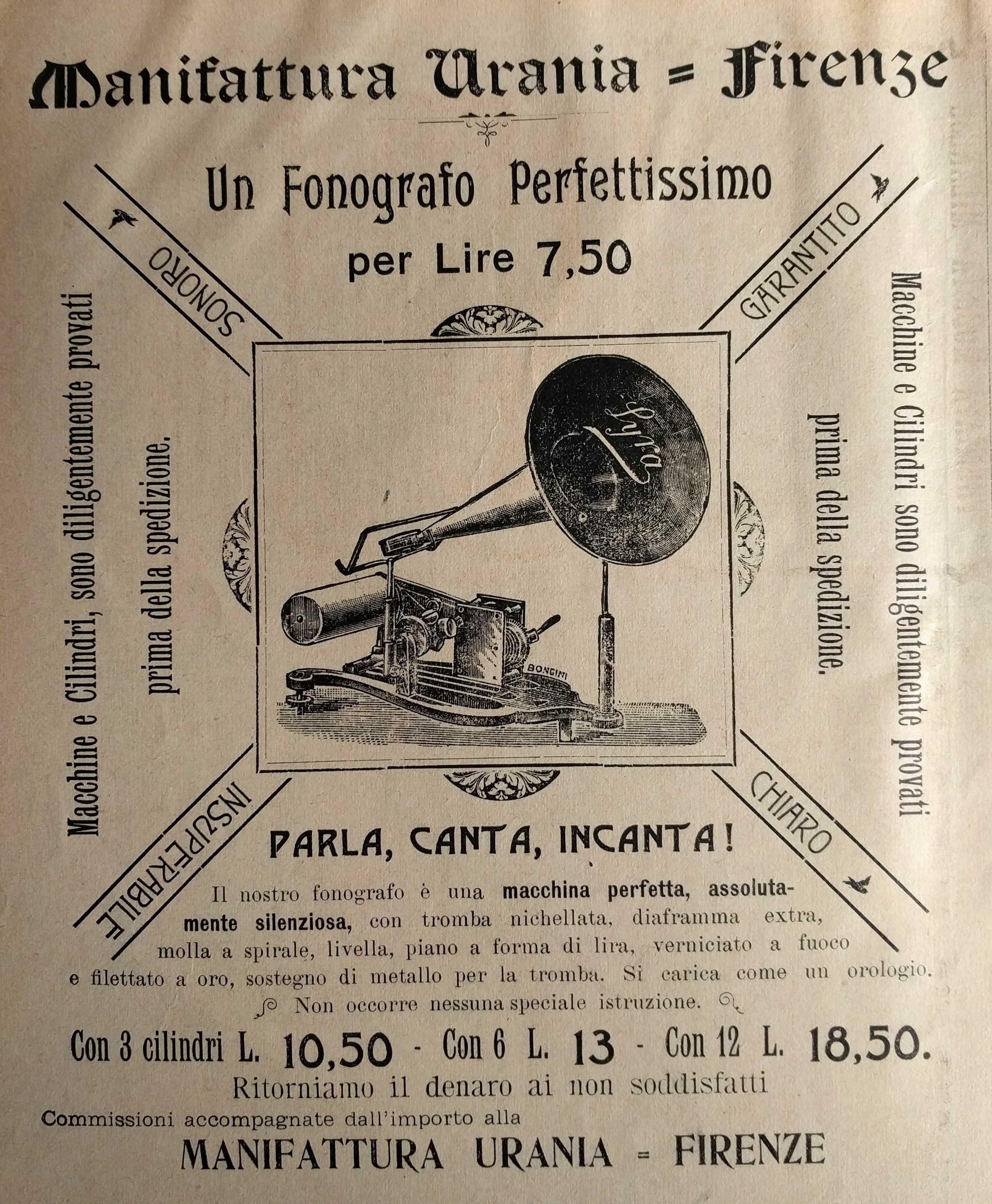 pubblicità di un fonografo dalla rivista Cordelia del 1904.